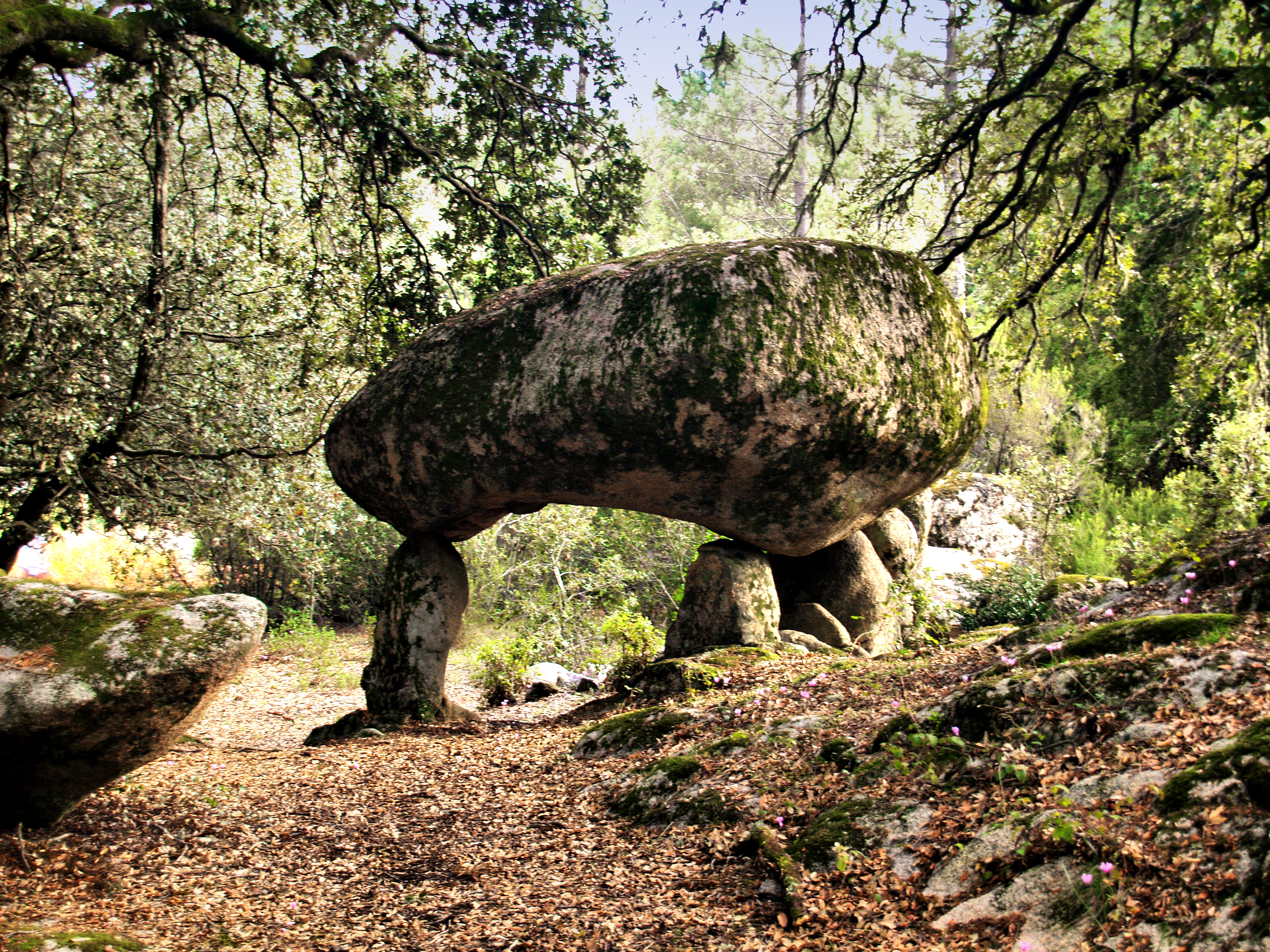 San-Gavino-di-Carbini, Alta-Rocca (Corse) - Dolmen sur la route de Pacciunituli.